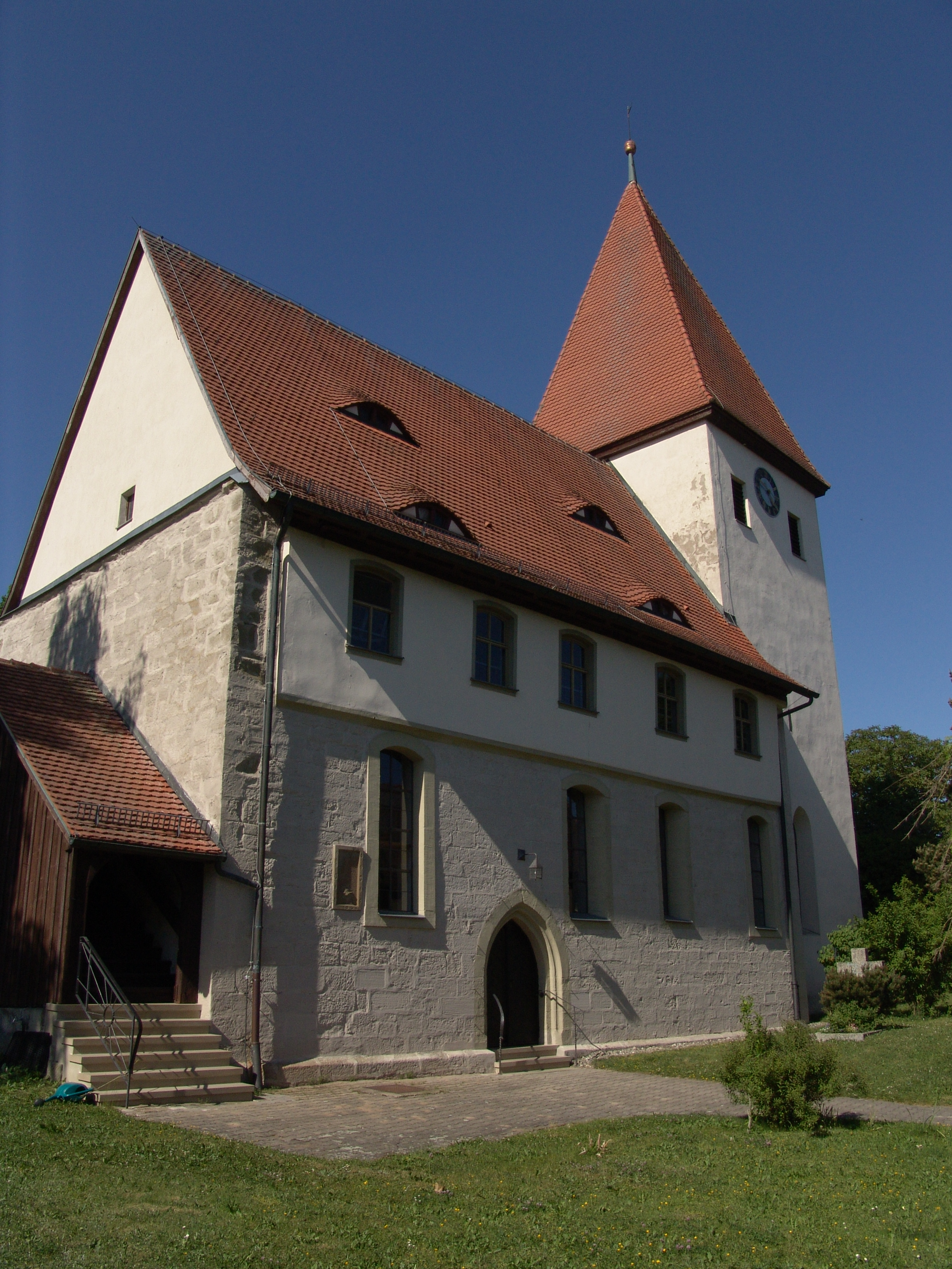 evang.-luth. Kirche St. Batholomäu in Unternesselbach